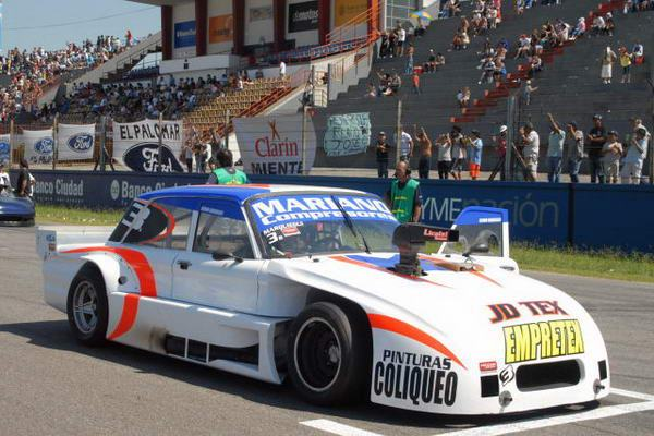 AG Sport Turismo 4000 Argentino Buenos Aires